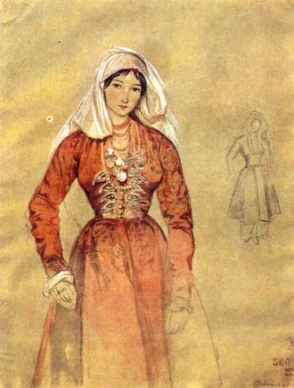 პორტრეტი